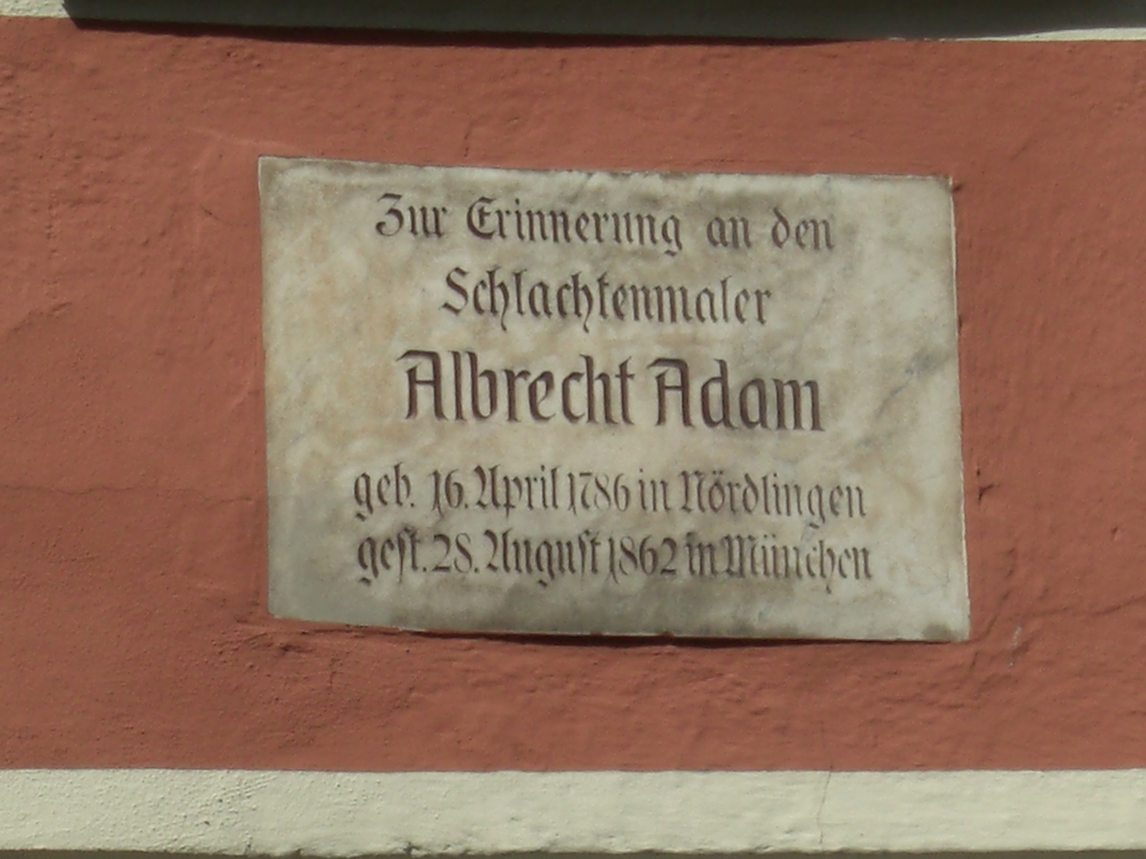 Gedenktafel für Albrecht Adam (1786-1862), Maler; Nördlingen